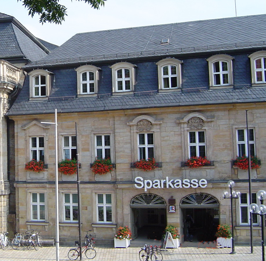 Bayreuth, Sparkasse, Opernstrasse 12, Denkmal Nr. D-4-62-000-277